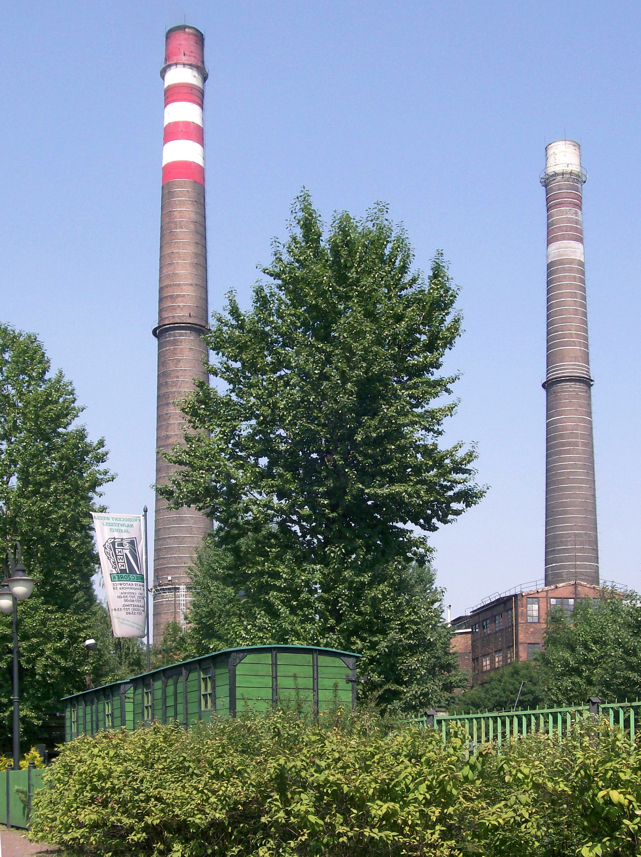 Elektrociepłownia "Jerzy" - obecnie wchodzi w skład Zakładu Energetyki Cieplnej w Katowicach. Na torowisku wagonik kolejki wąskotorowej Balkan obok szybu Pułaski - KWK Wieczorek.